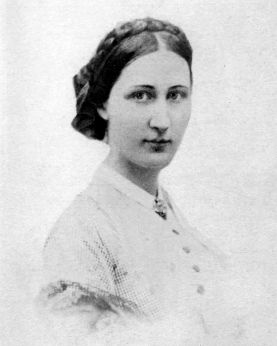 Княгиня Екатерина Святославовна Шаховская, ур. Бержинская (ум. 1871)